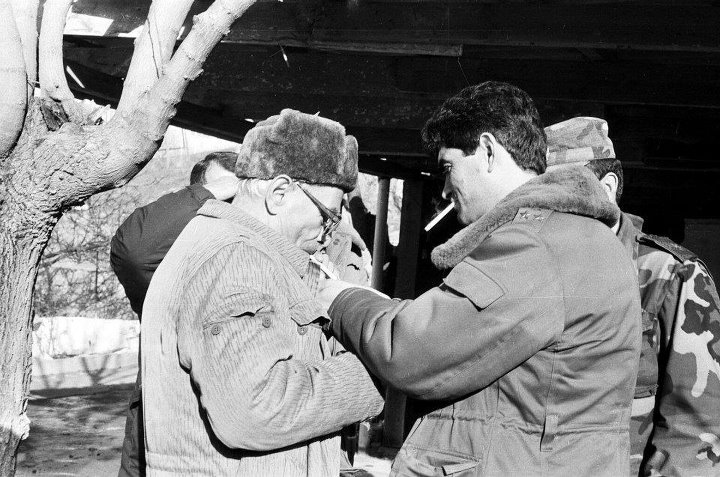 no original description